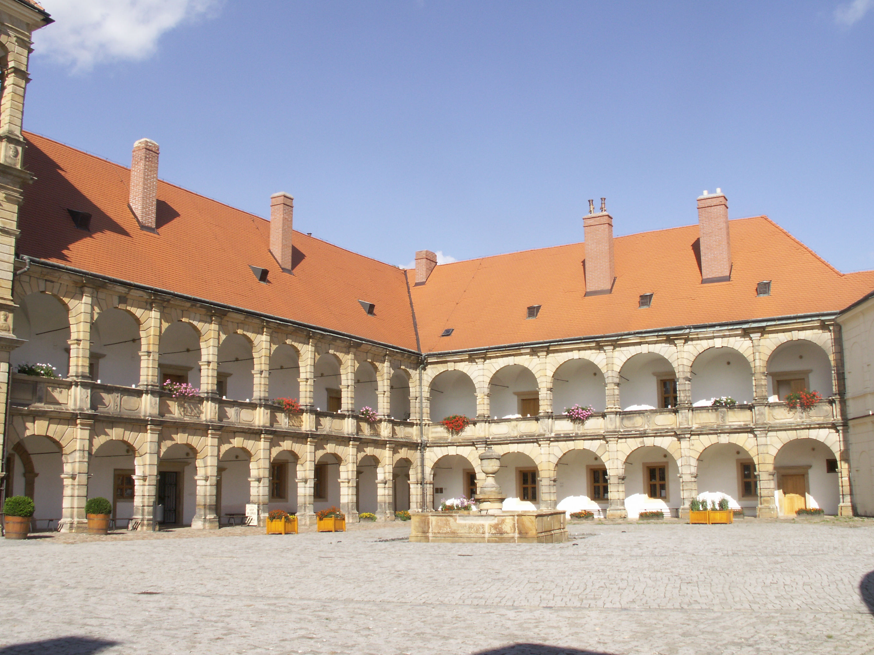 levé křídlo zámku Moravská Třebová